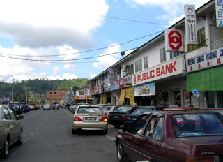 Pekan jerantut